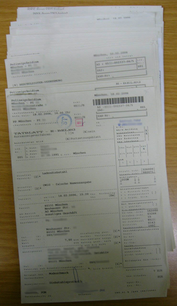 Strafanzeige (hier ein Tatblatt E-Beleg)